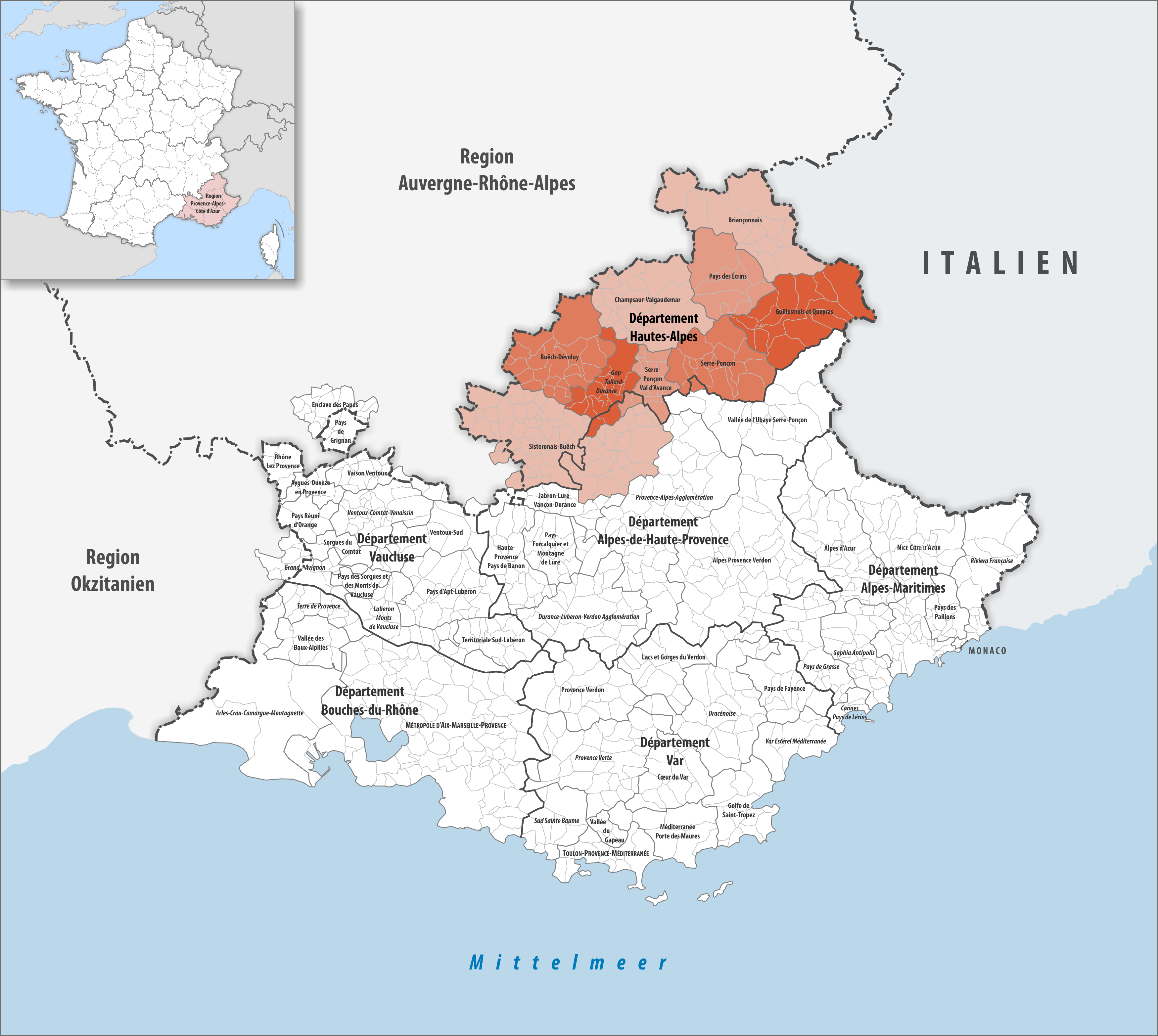 Gemeindeverbände im Département Hautes-Alpes